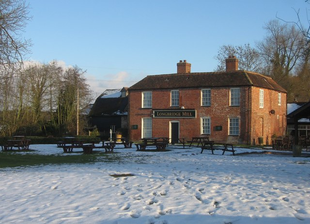 Longbridge Mill